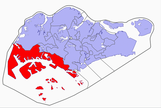 Singapore electoral map, 2006